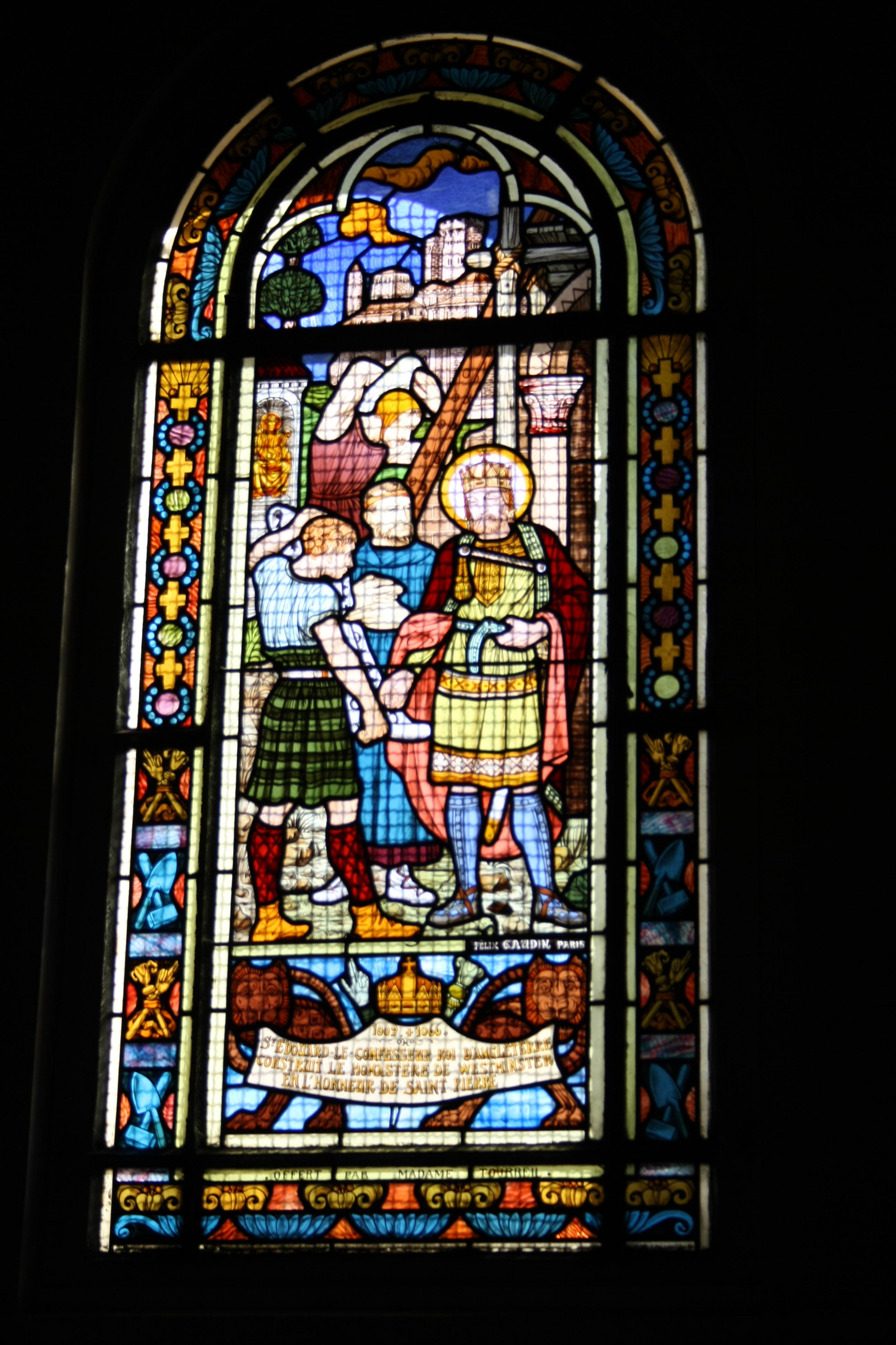 Bleiglasfenster in der Kirche Saint-Honoré d'Eylau (Avenue Raymond-Poincaré im 16. Arrondissement von Paris), Darstellung: hl. Eduard der Bekenner, Hersteller des Fensters: Félix Gaudin nach einem Karton von Raphaël Freida, Signatur: "Félix Gaudin Paris"